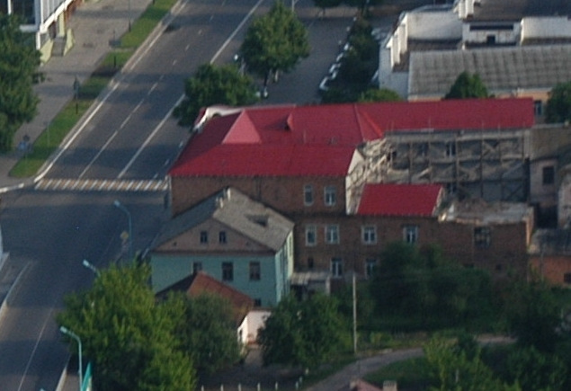 Пинск